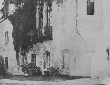 Беларуская (тарашкевіца): Дзявяткавічы (Dziaviatkavičy), сядзіба Сьлізняў (Ślizień)